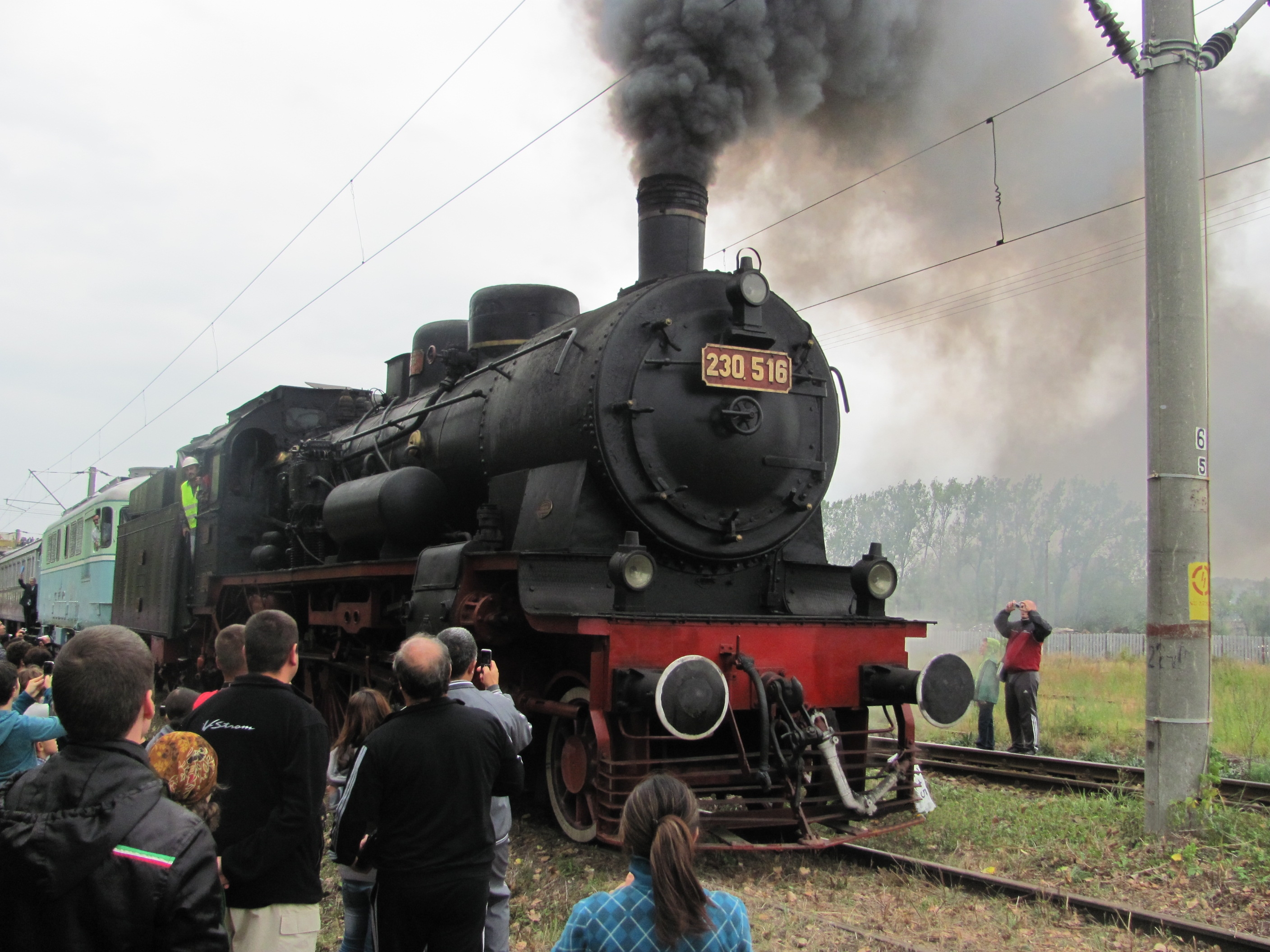 Locomotiva seria 230.516, fabricată la Reșița in anul 1936, tractand trenul regal